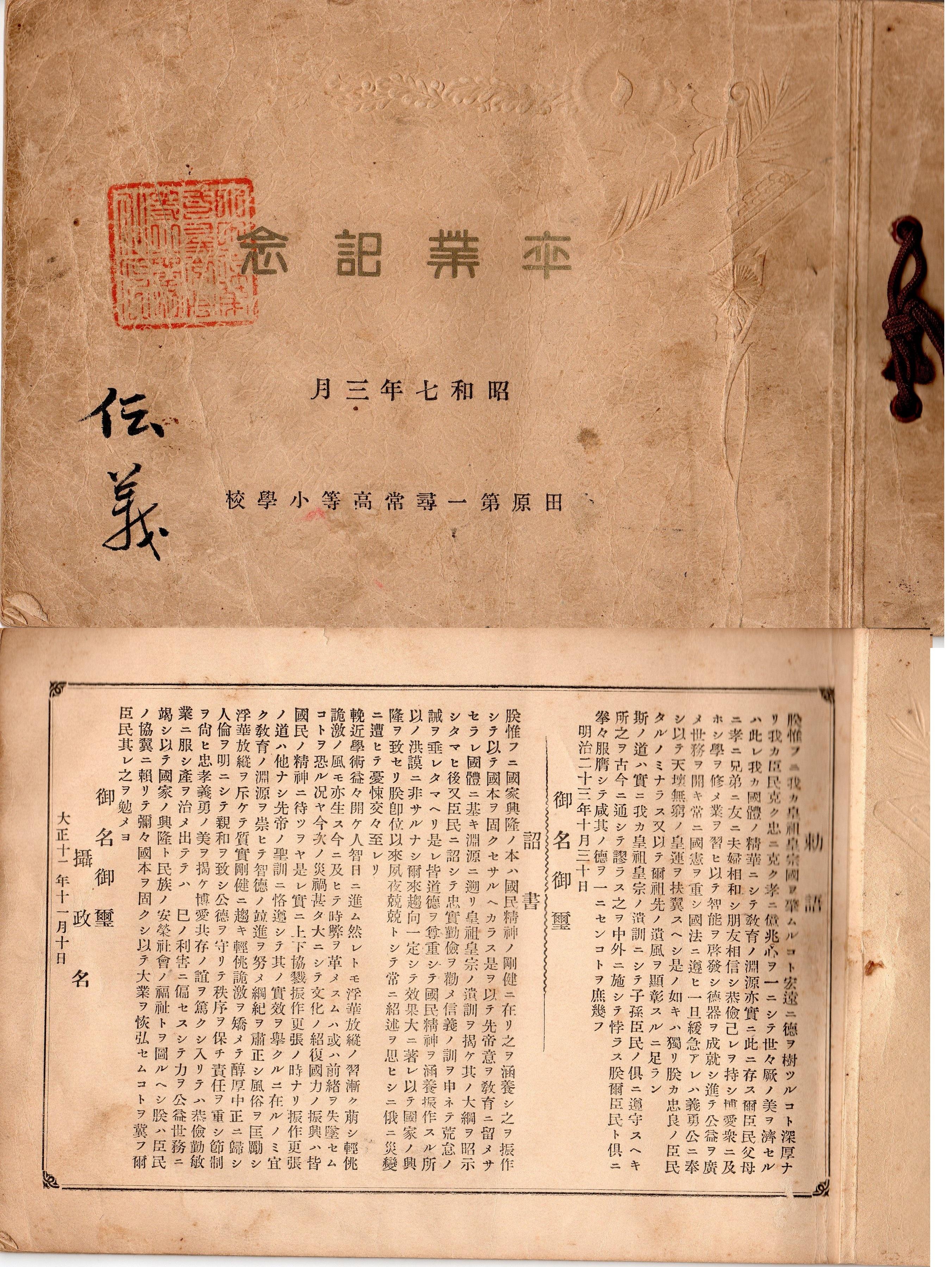 昭和7年(齋藤傳義蔵)